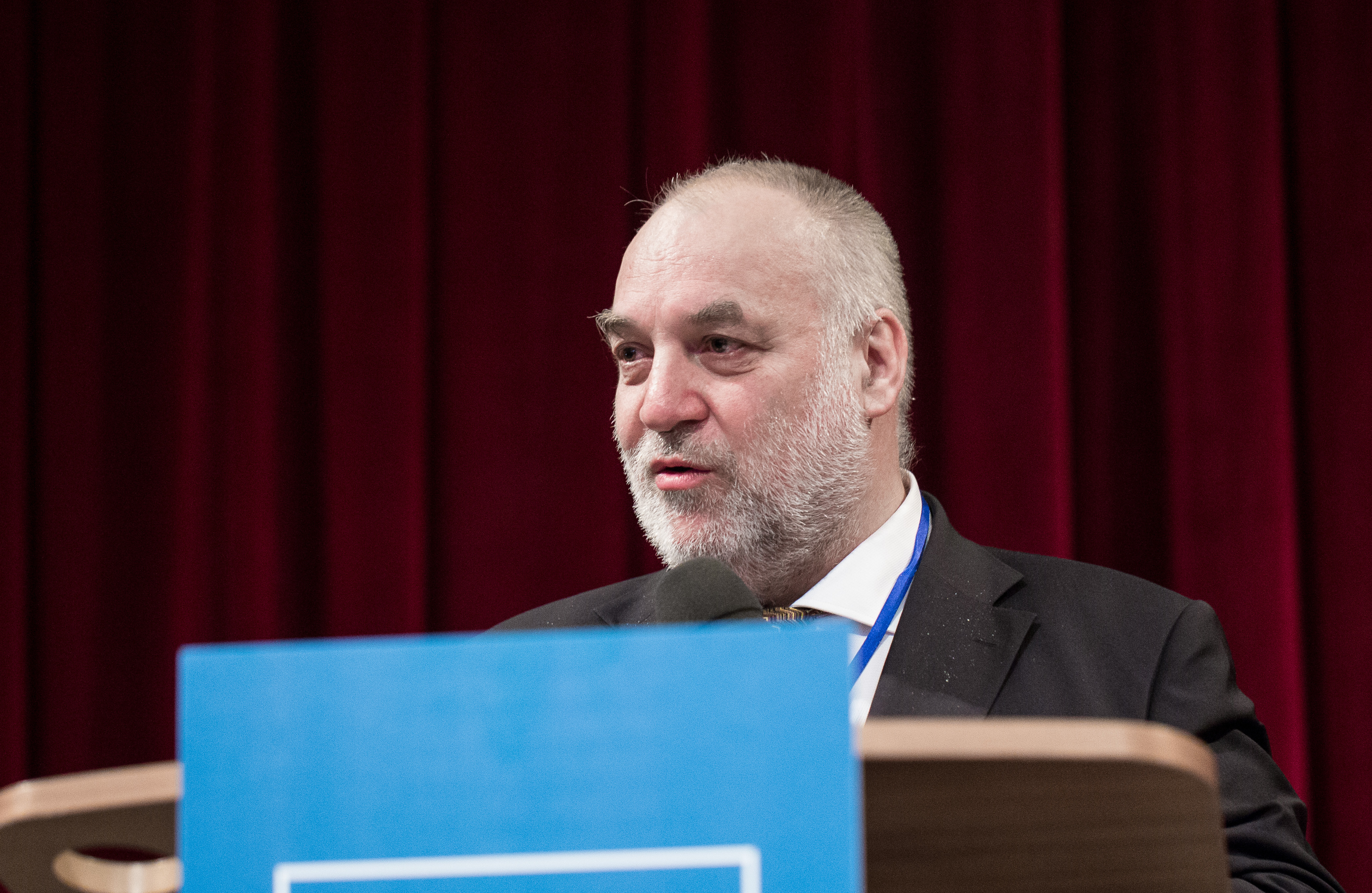 Alfred Pritz bei der Eröffnung einer Fachtagung des RPP-Institutes über "Glück und Seligkeit" am 20. April 2013 im Palais Liechtenstein (Fürstengasse)